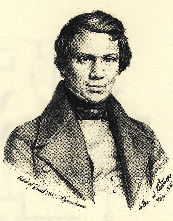 Nils Månsson Mandelgran, grundaren av Svenska Slöjdföreningen